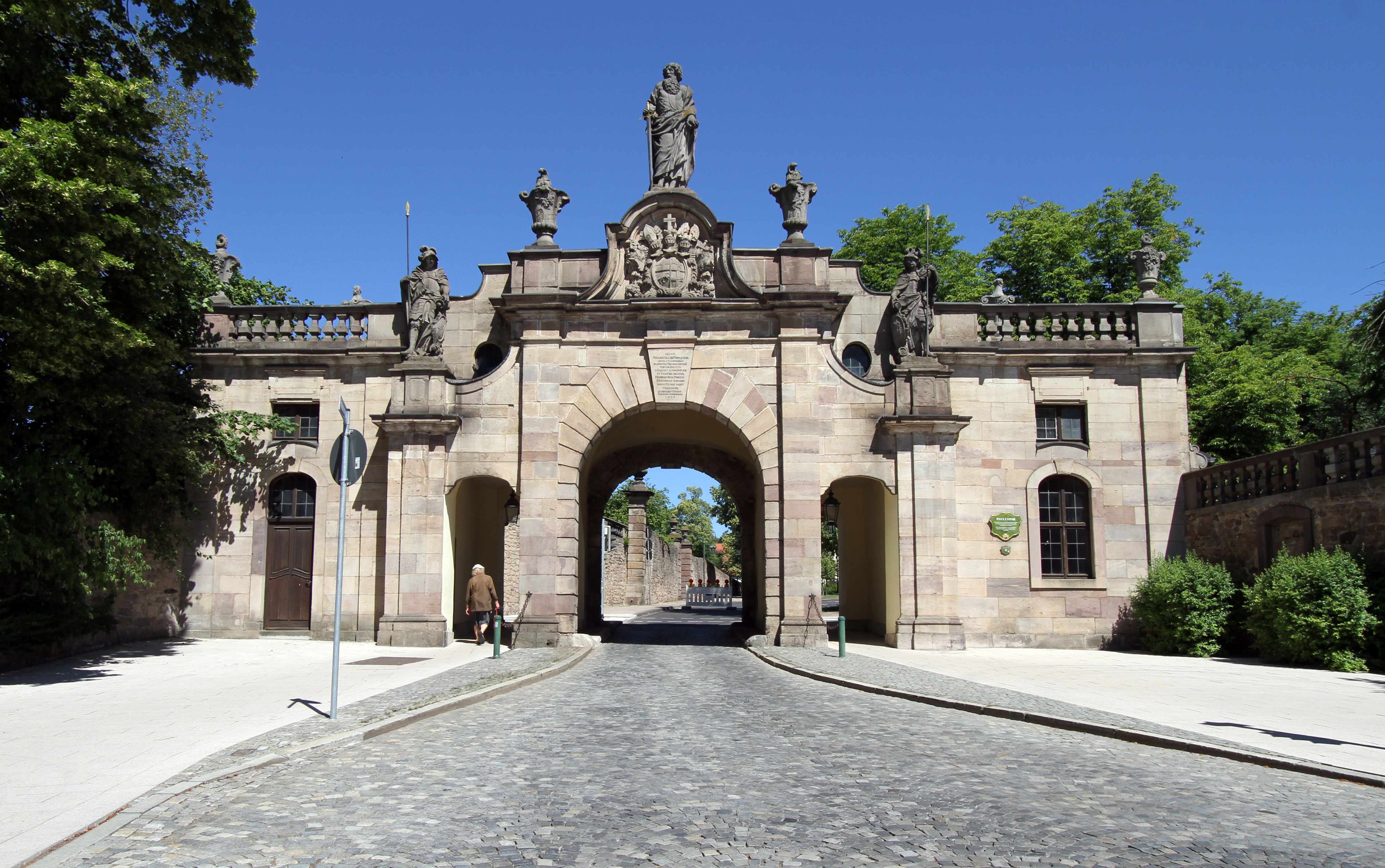 Paulustor (Fulda)